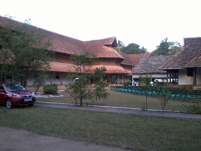 കുതിരമാളിക- ഒരു വിദൂരവീക്ഷണം